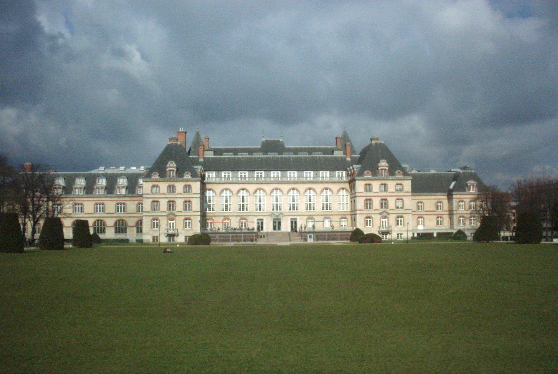 Grasveld achter het ciup